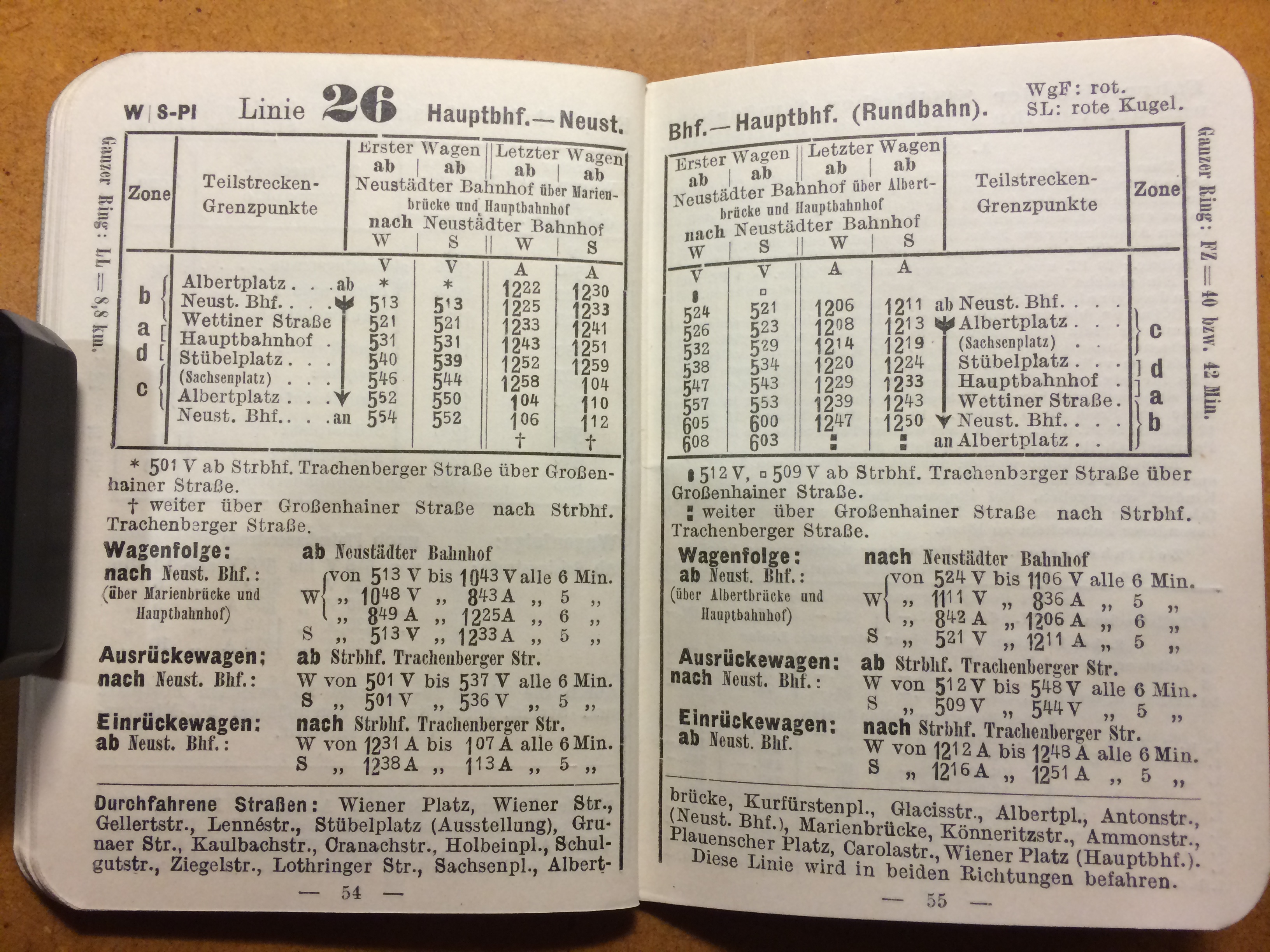 Fahrplan der Rionglinie 26 von 1910. Aus dem Fahrplan der Städtischen Straßenbahn zu Dresden, ab 3. Mai 1910, Selbstverlag.